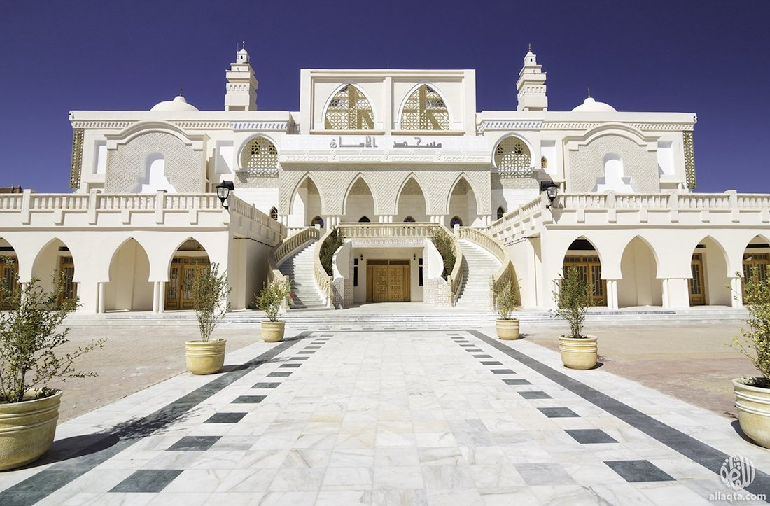 مسجد الامان سوق اهراس